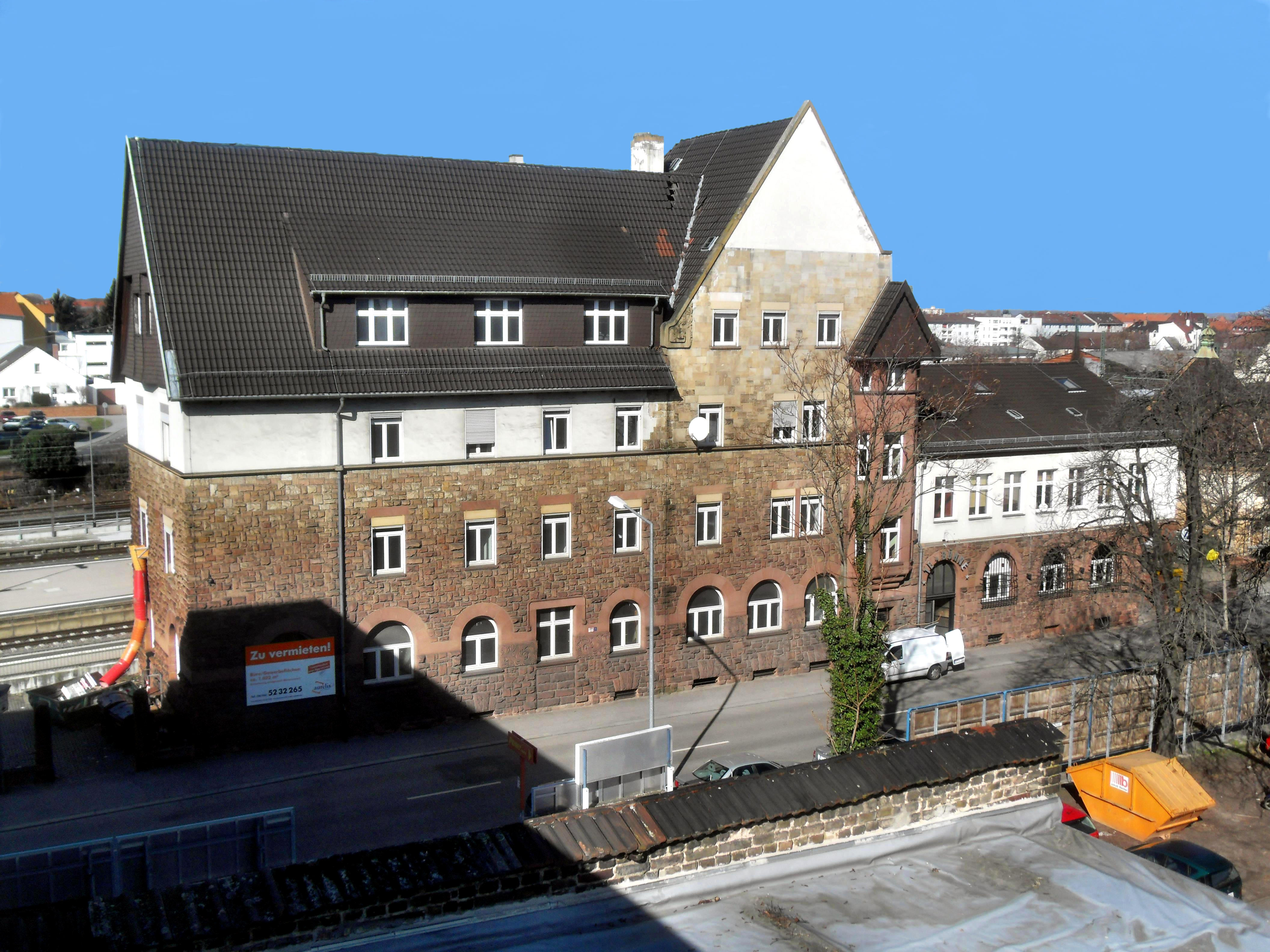 Die Gebäude der ehemaligen Wormser Bahnpost am Wormser Hauptbahnhof in Rheinland-Pfalz (Deutschland)